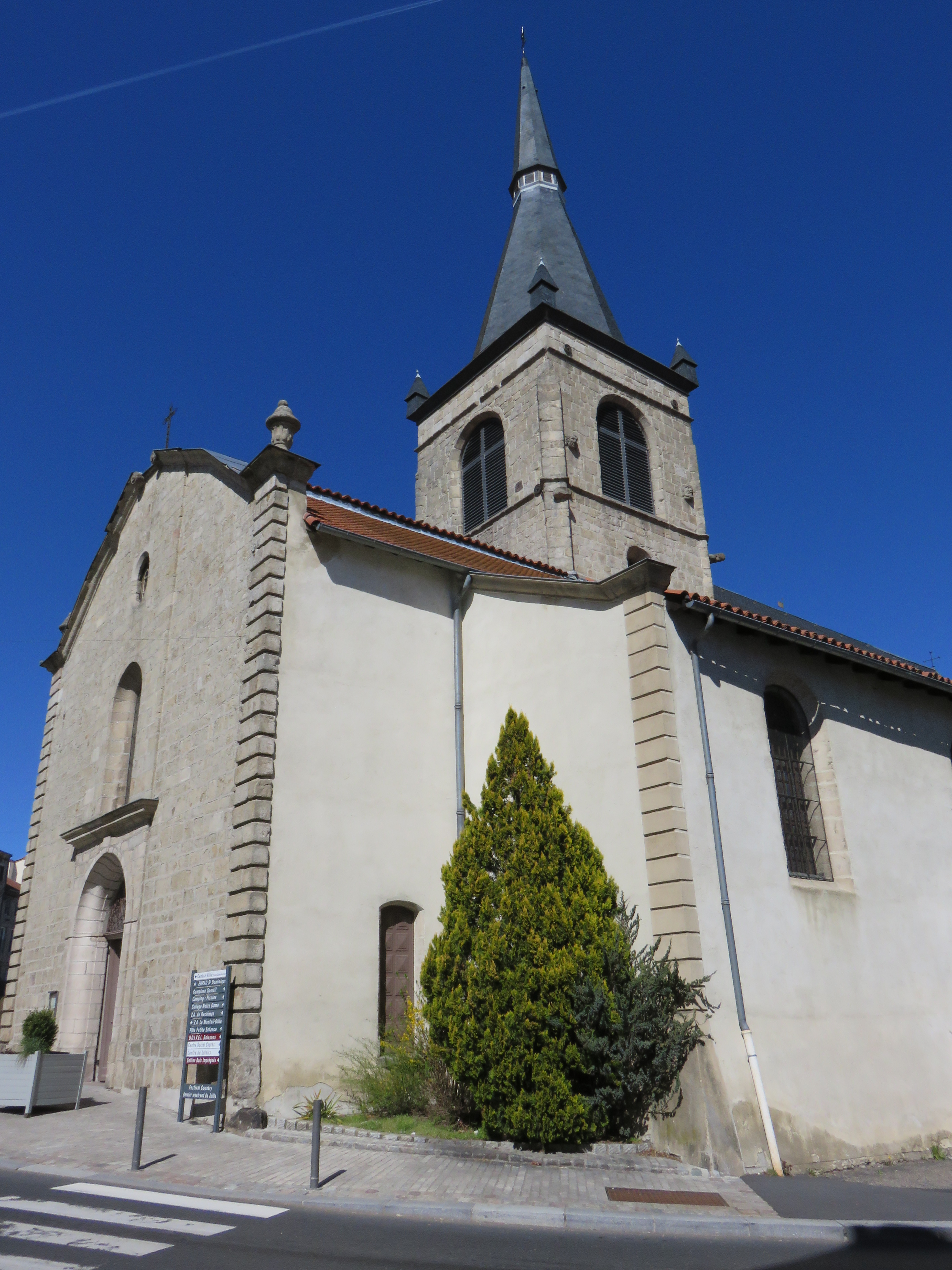 Clocher de l'église Saint-Caprais de Craponne-sur-Arzon (Haute-Loire, France).